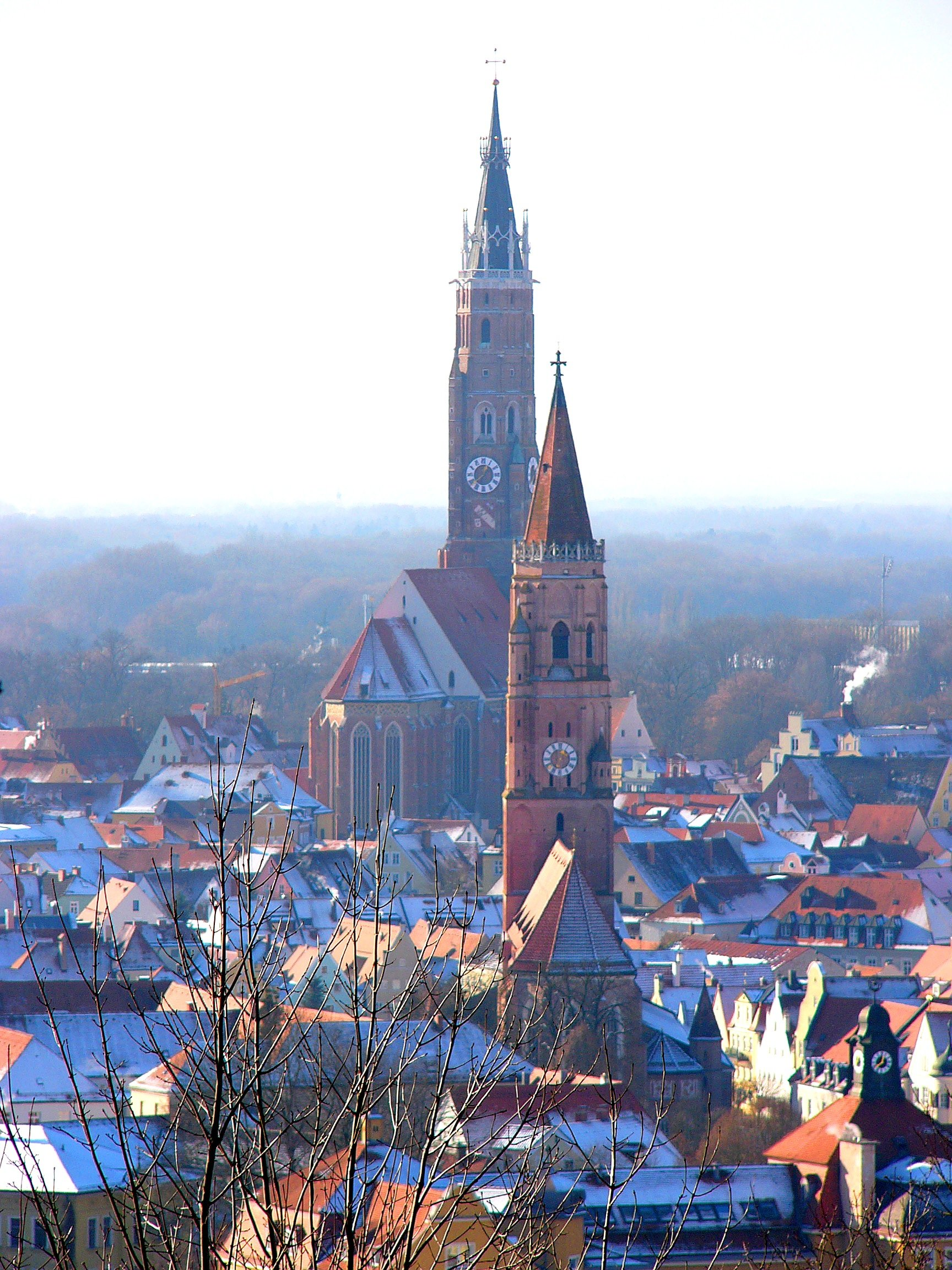 Katholische Stadtpfarr- und Kollegiatstiftskirche St. Martin und St. Kastulus und die Jodokskirche von der Carossahöhe aus gesehen.This is a photograph of an architectural monument.